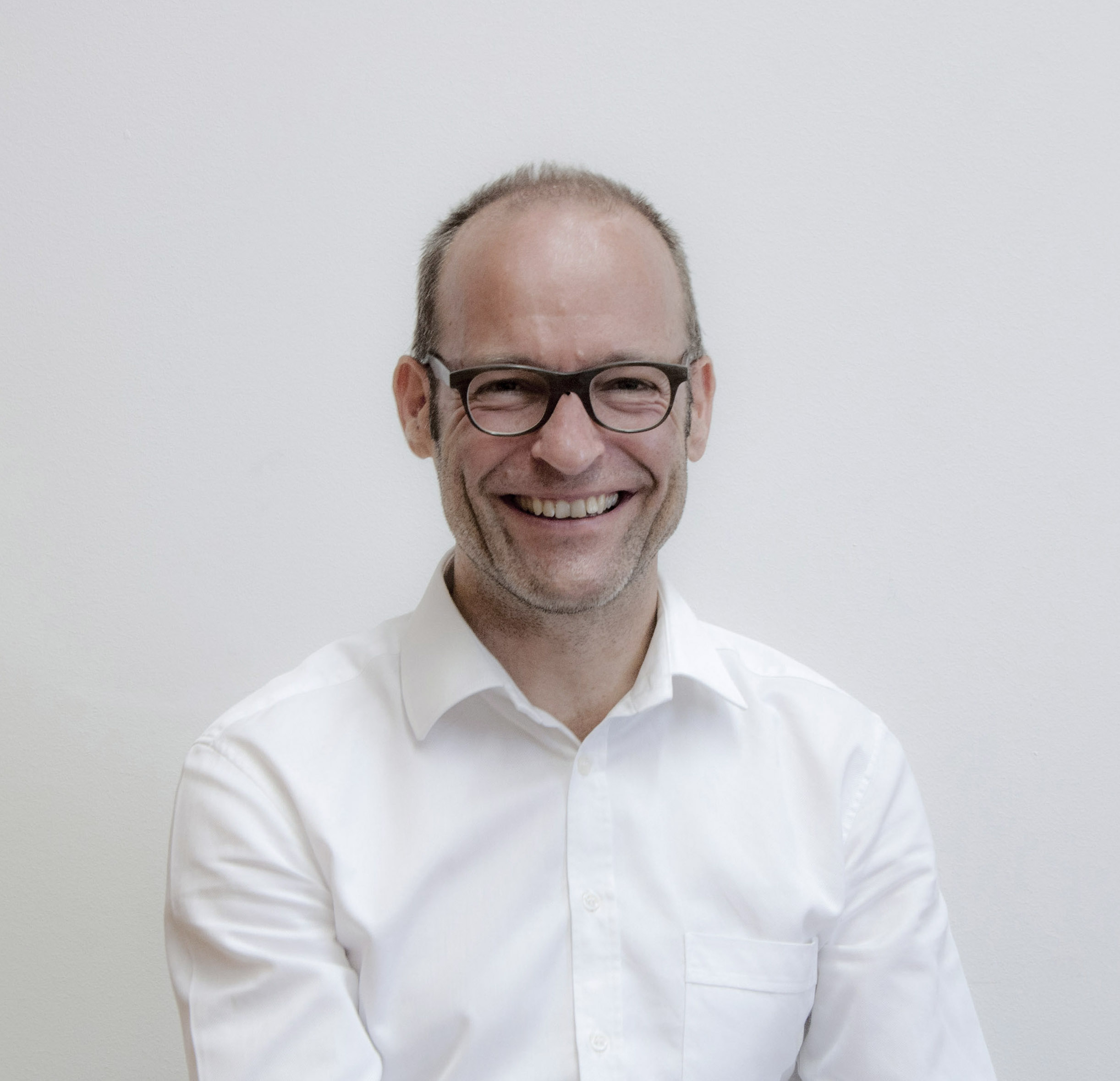 Porträt Andres Lepik